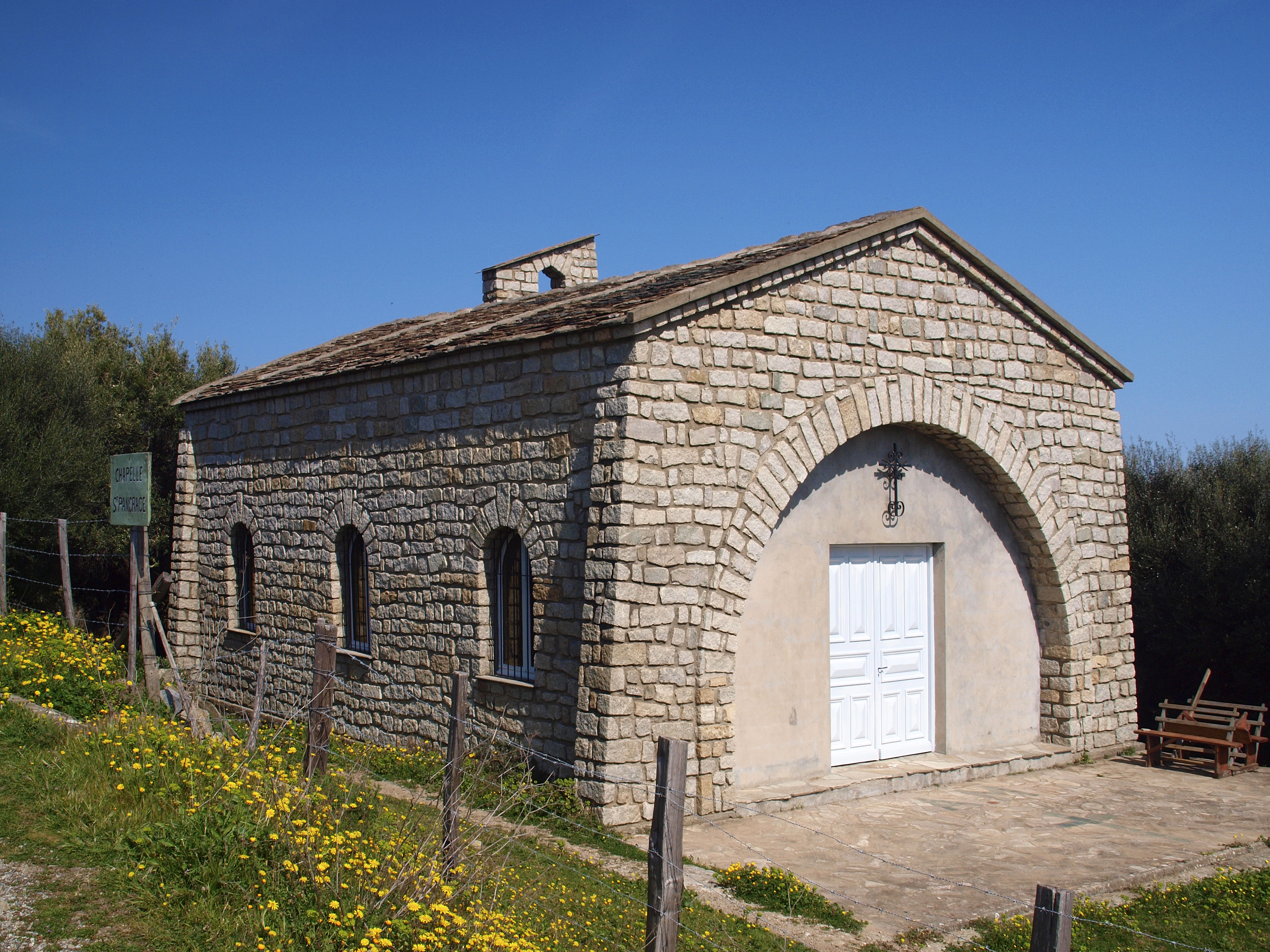 Santo-Pietro-di-Tenda (Corsica) - Chapelle Saint-Pancrace à Casta